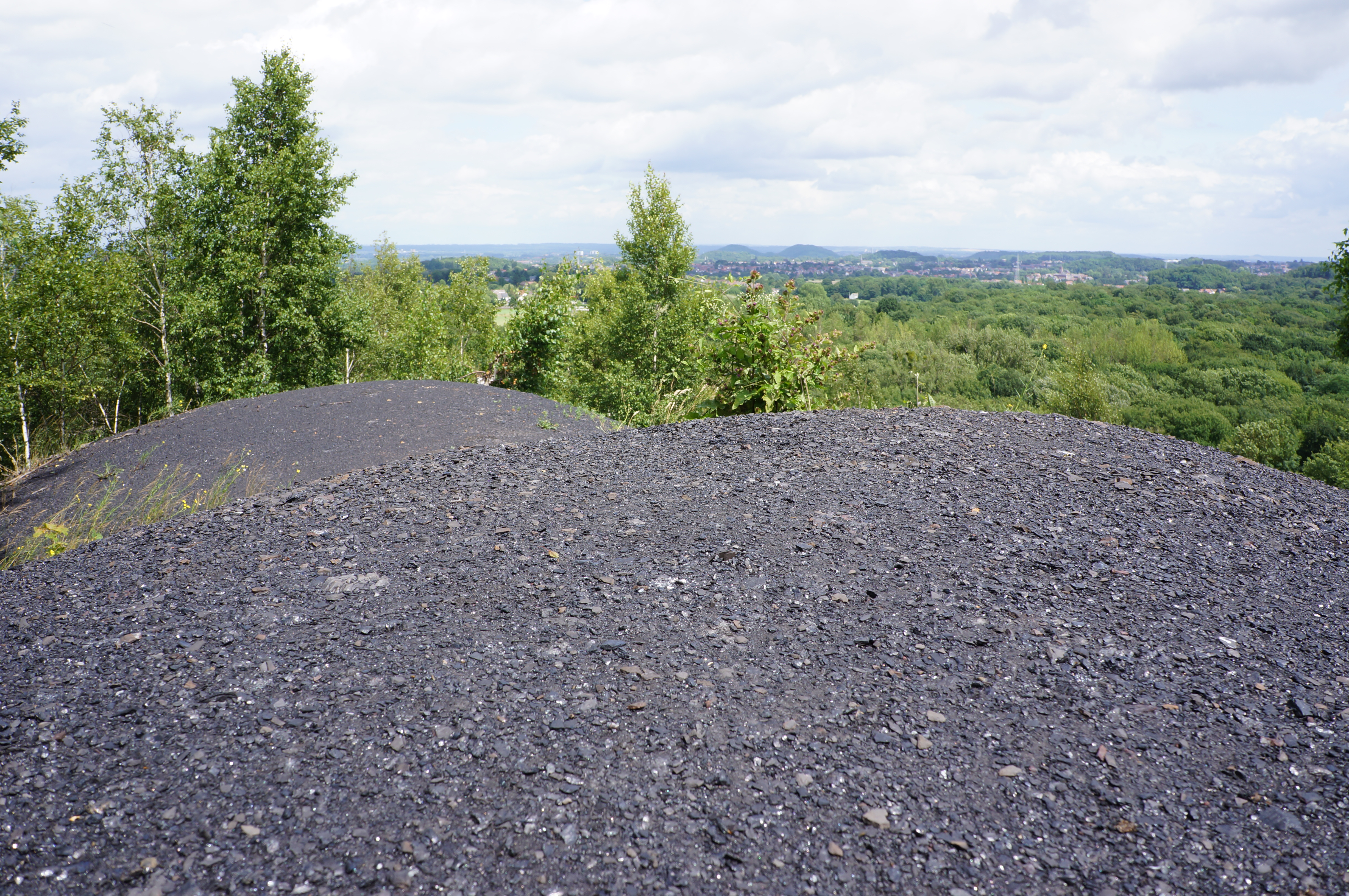 Charbonnage de Sauwartan: terril.